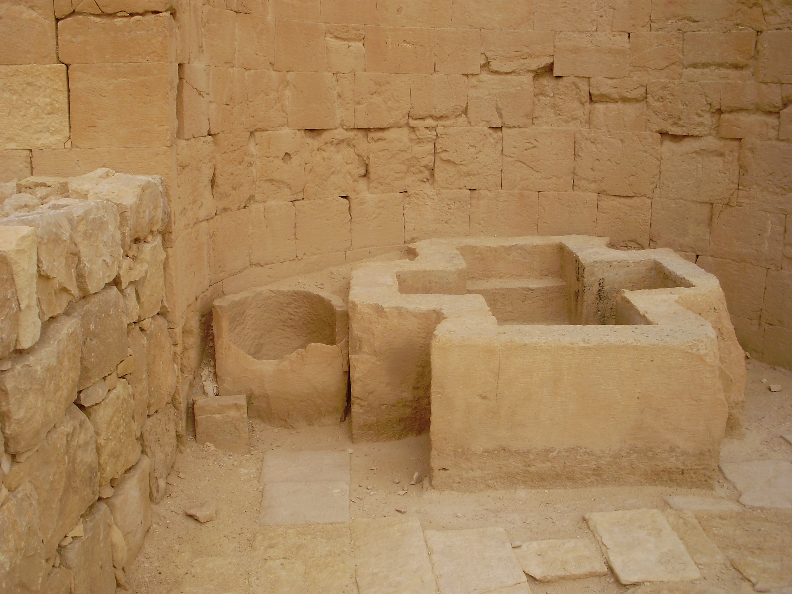 Site archéologique de Shivta.